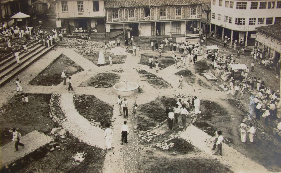 Centro de Piñas en antaño